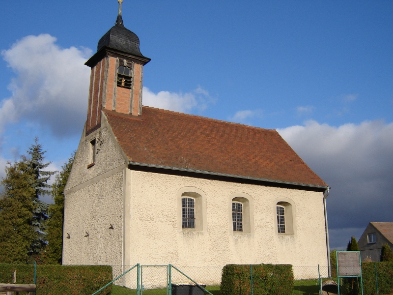 Kirche in Möckern-Brietzke, Sachsen-Anhalt